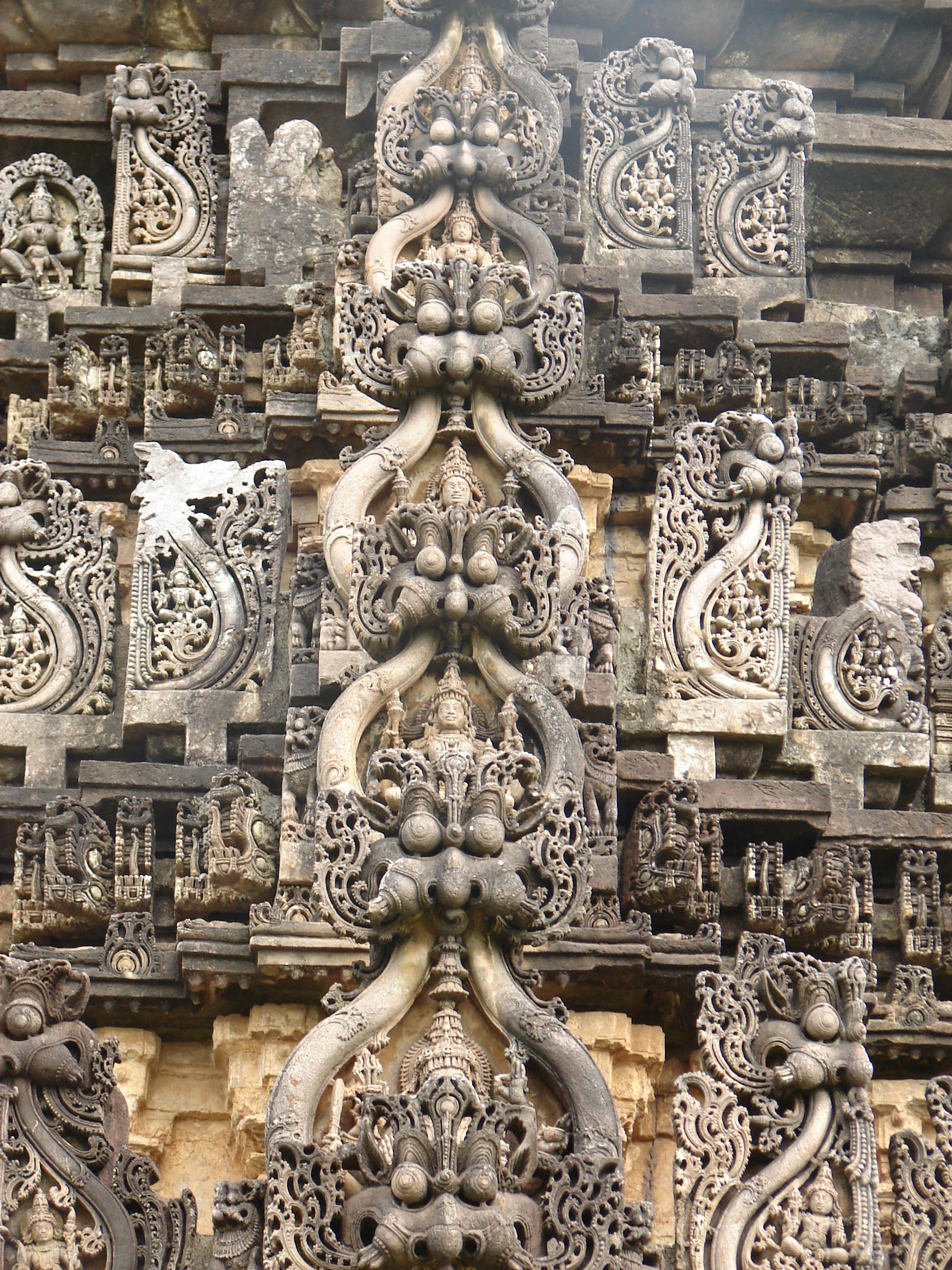 Amritheshwara temple in Amrithapura, Chikkamagaluru district, Karnataka state , India